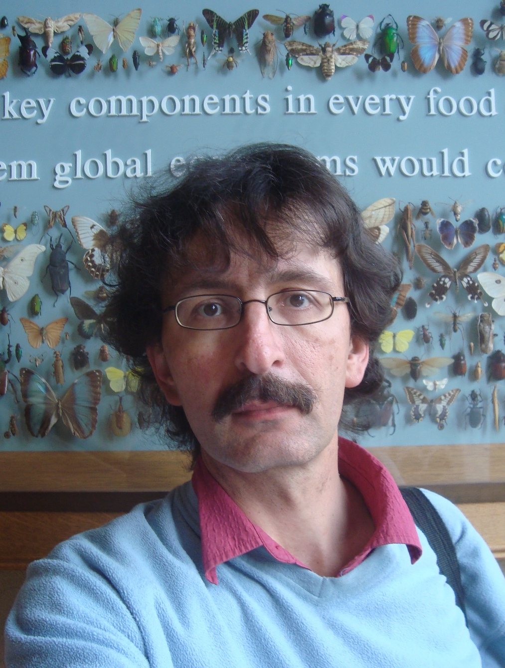 Michael Groß (Autor), Selbstportrait, Oxford University Museum, Oxford